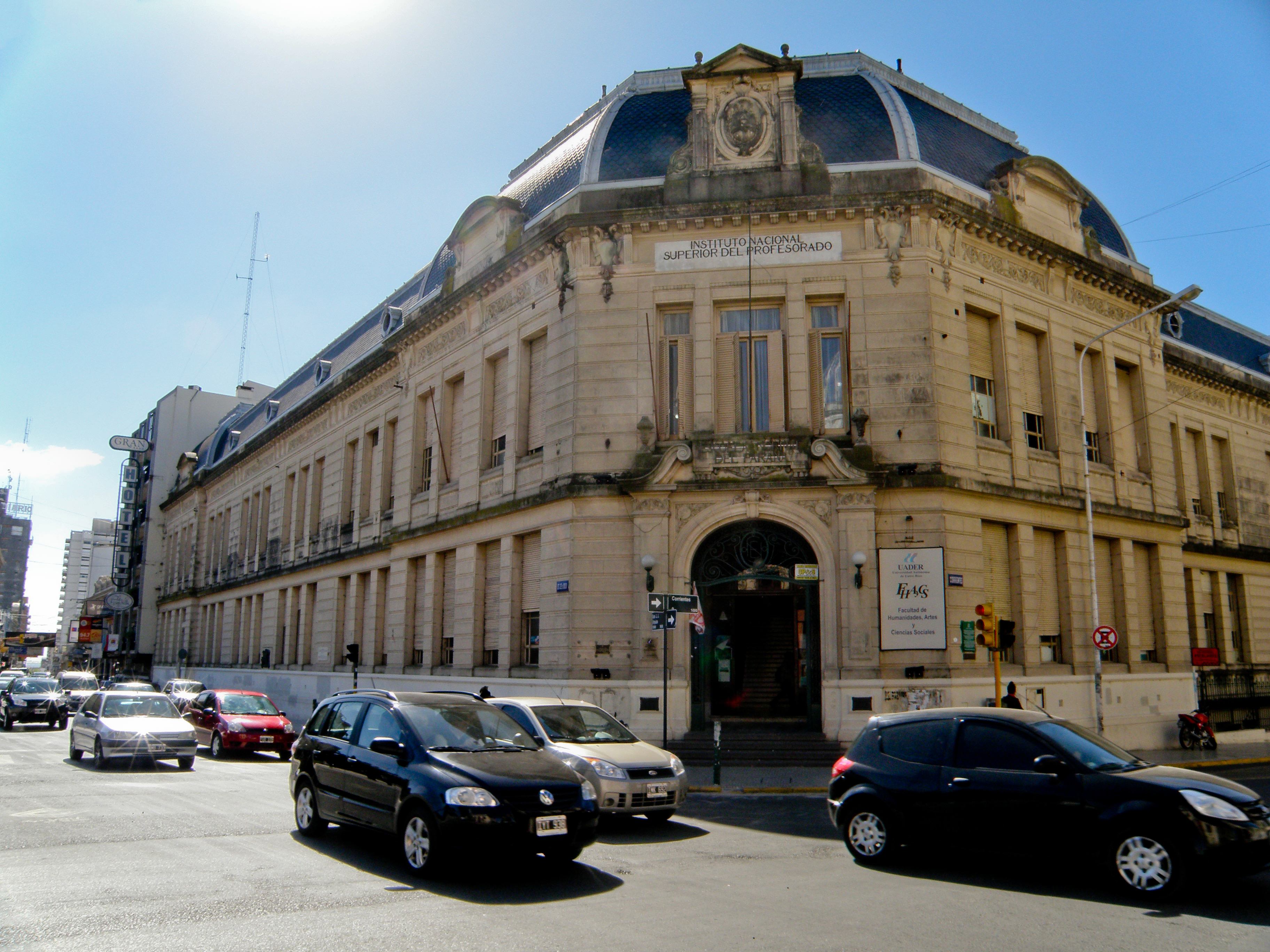 Fue la primera Escuela Normal del país, fundada el 13 de junio de 1870 por Domingo Faustino Sarmiento. El edificio ocupa la edificación demolida de la Casa de Gobierno y la Cámara de Diputados de la Confederación Argentina. La Escuela está ubicada en la intersección de Monte Caseros y Urquiza.